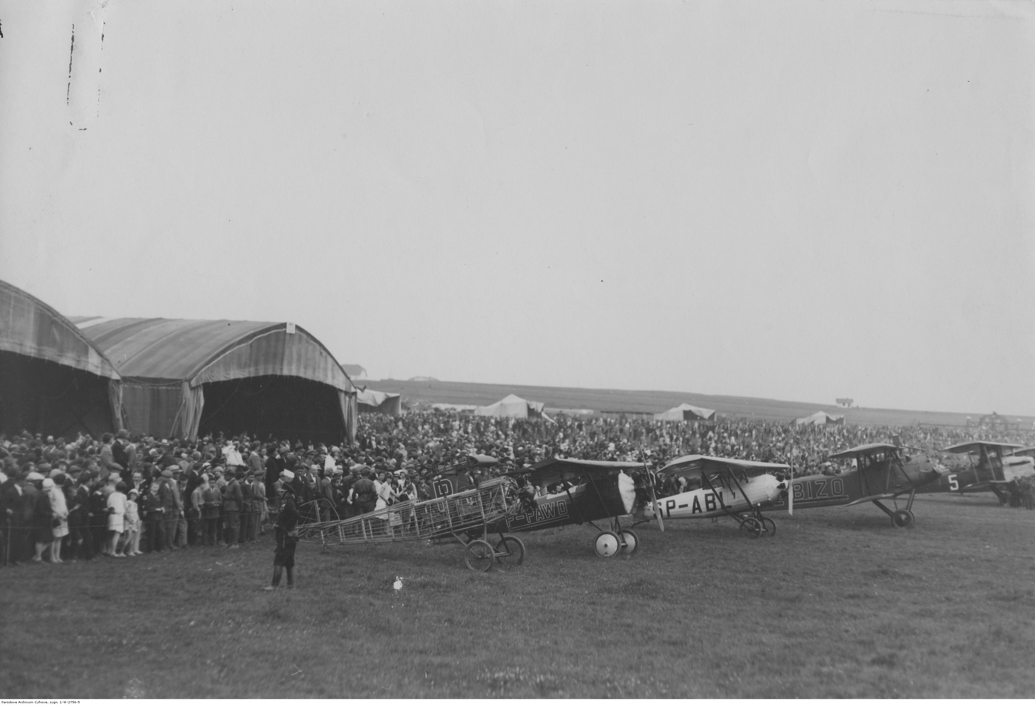 Samoloty na lotnisku i tłum osób uczestniczących w Tygodniu lotniczym w Krakowie. Widoczny samolot DKD-IV o numerze SP-ABL i DKD-III o numere P-PAWD.